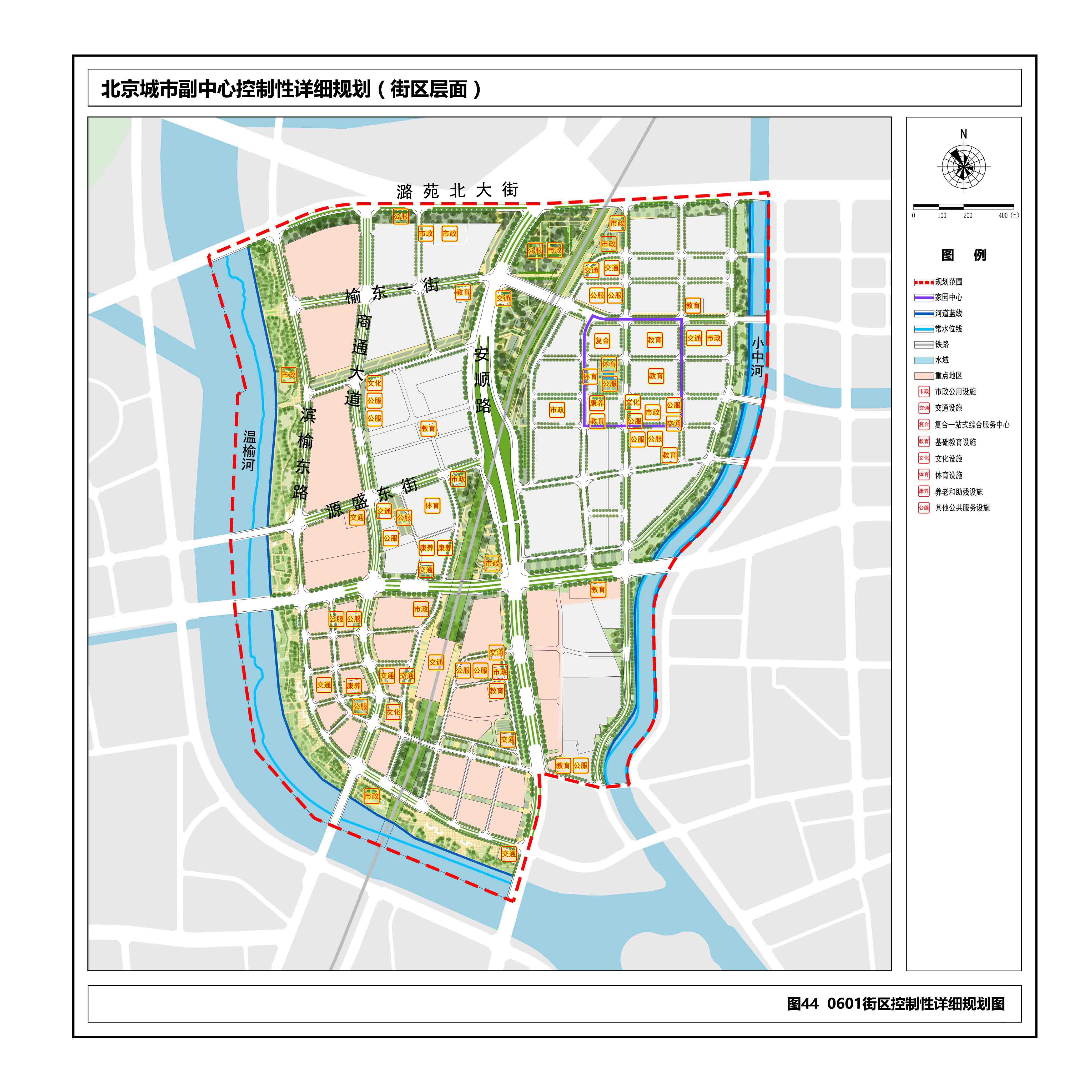 中文（中国大陆）: 北京城市副中心控制性详细规划（街区层面）（2016年-2035年）